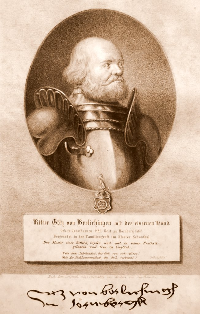 Götz von Berlichingen. Götz von Berlichingen mit seiner Unterschrift. (Götz von Berlichingen zu Hornberg). Götz von Berlichingen zu Hornberg war Besitzer im 16. Jahrhundert. Portrait des Götz von Berlichingen.